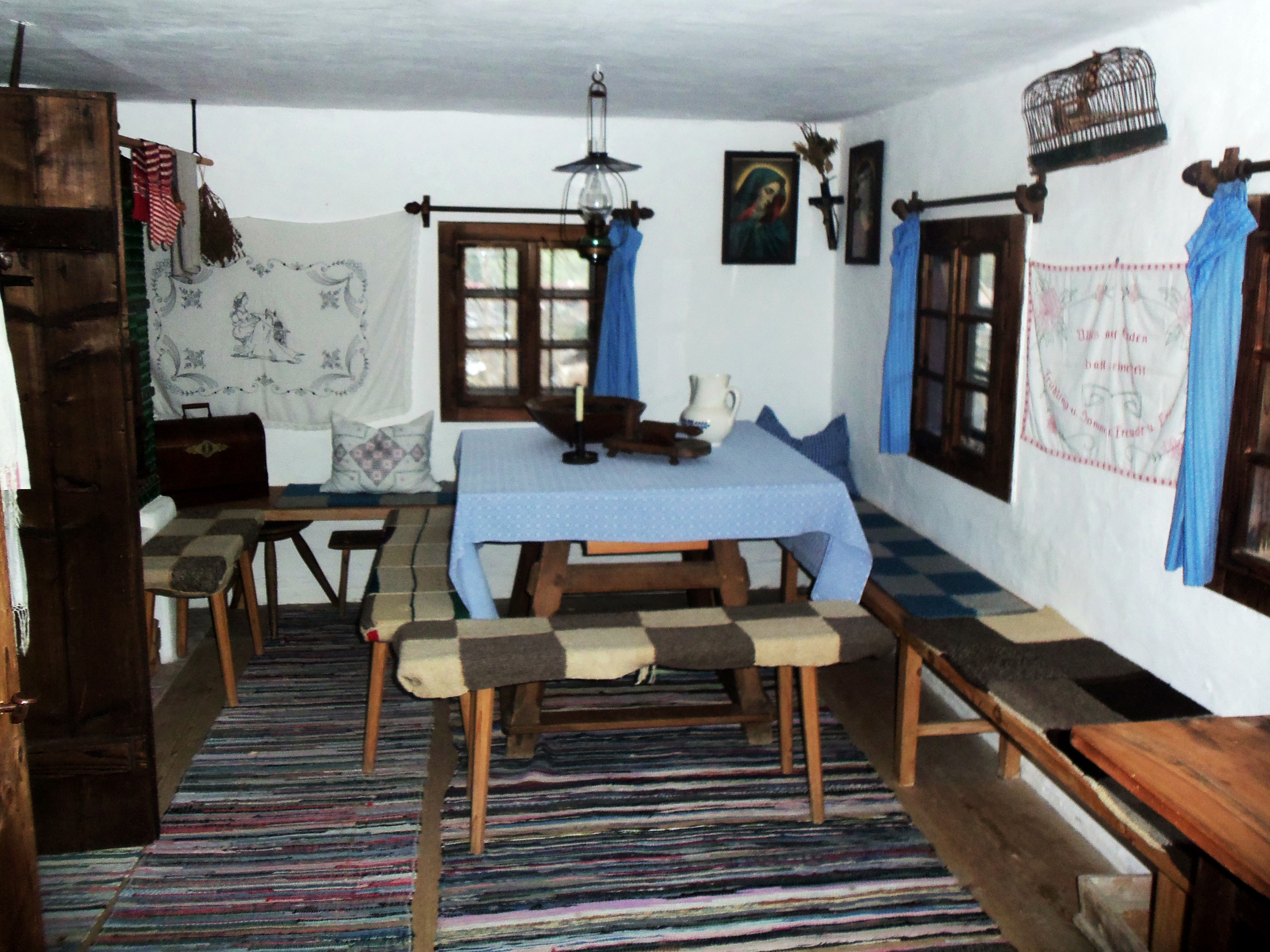 Heimathaus Essbereich